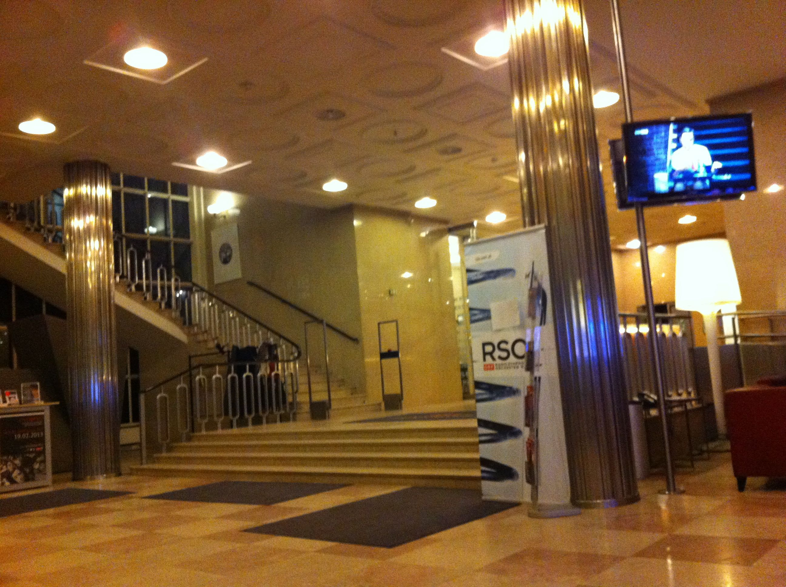 ORF Funkhaus Wien Lobby Februar 2013